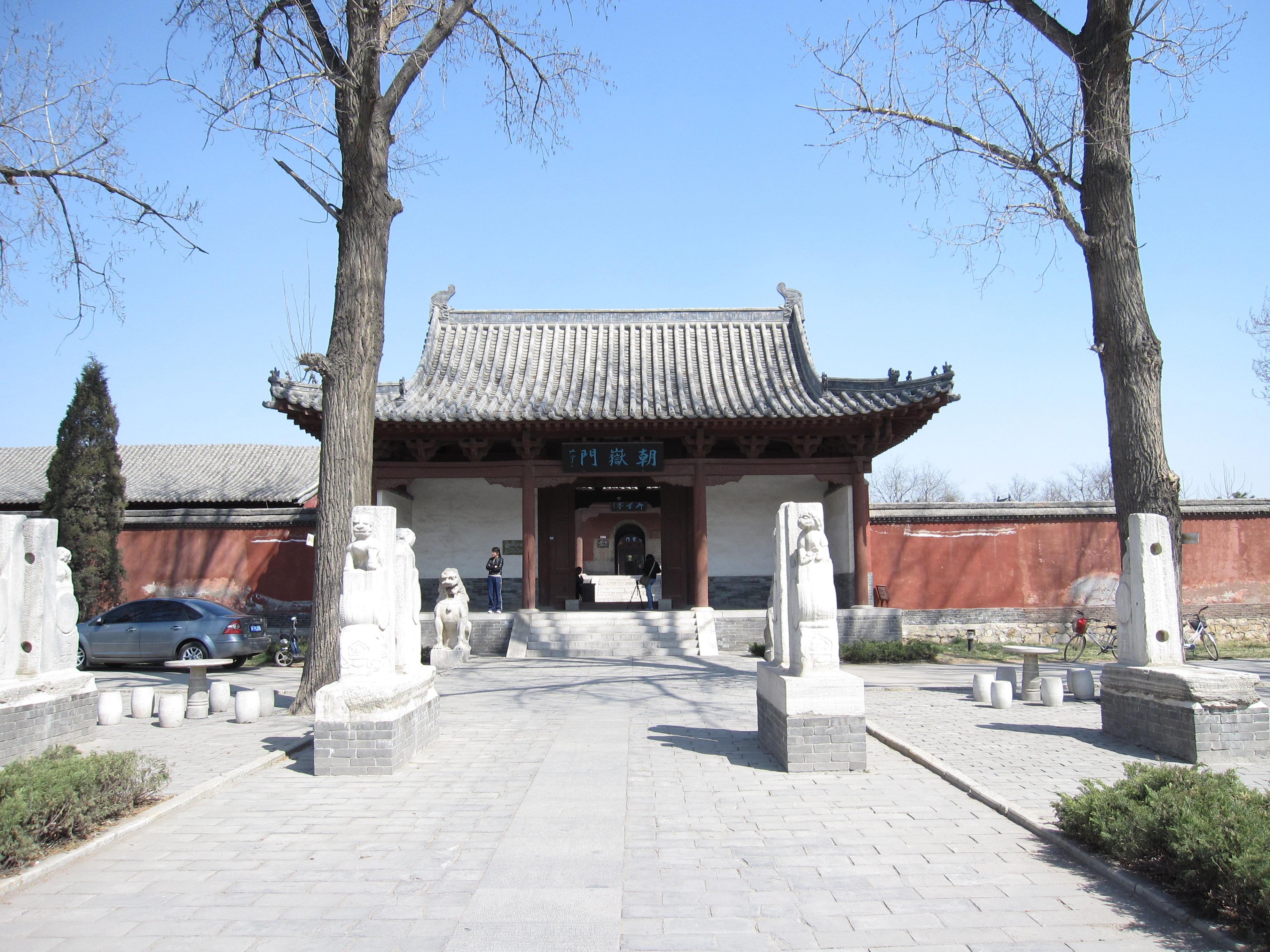 Beiyue Temple